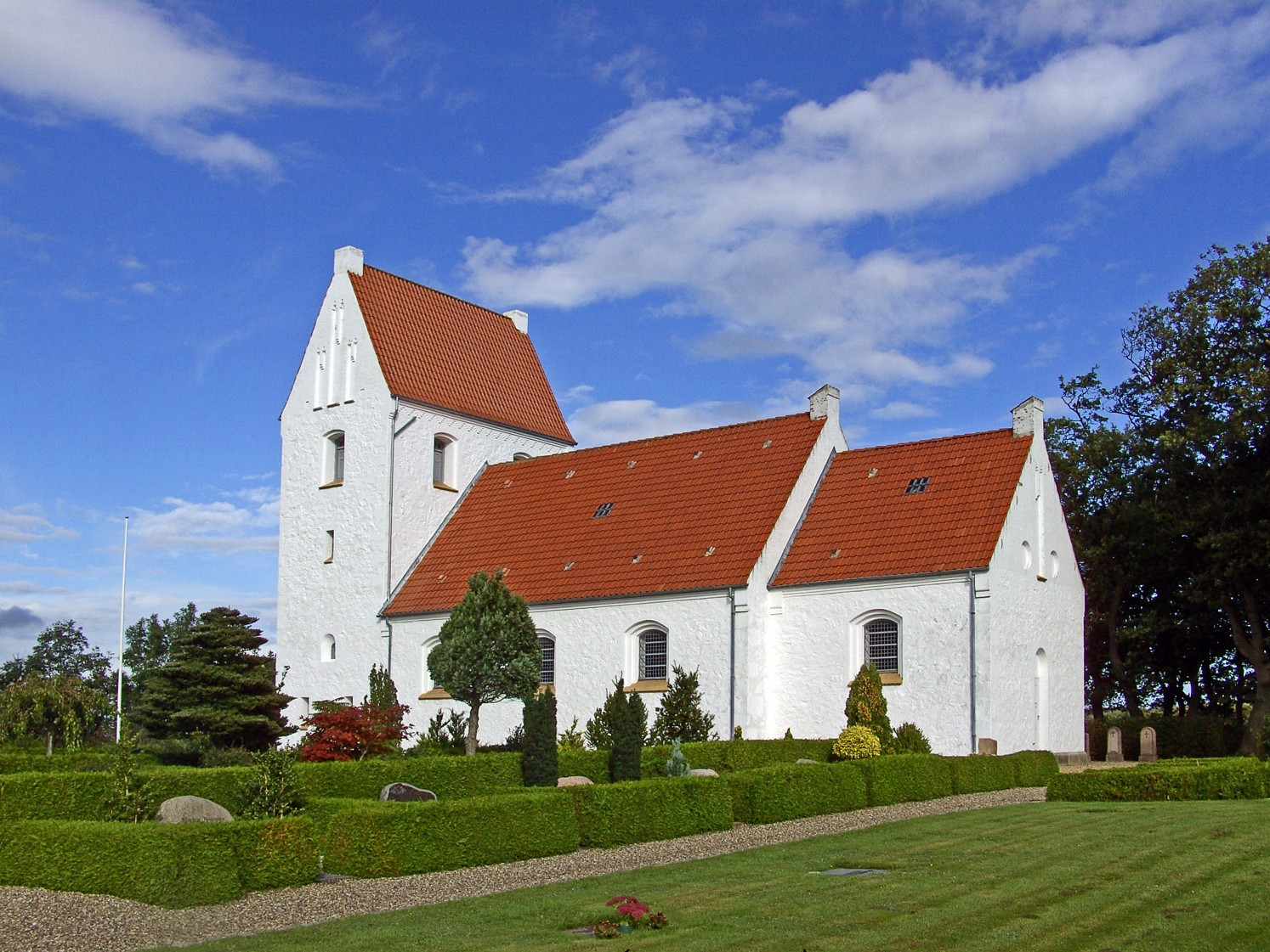 fra sydøst